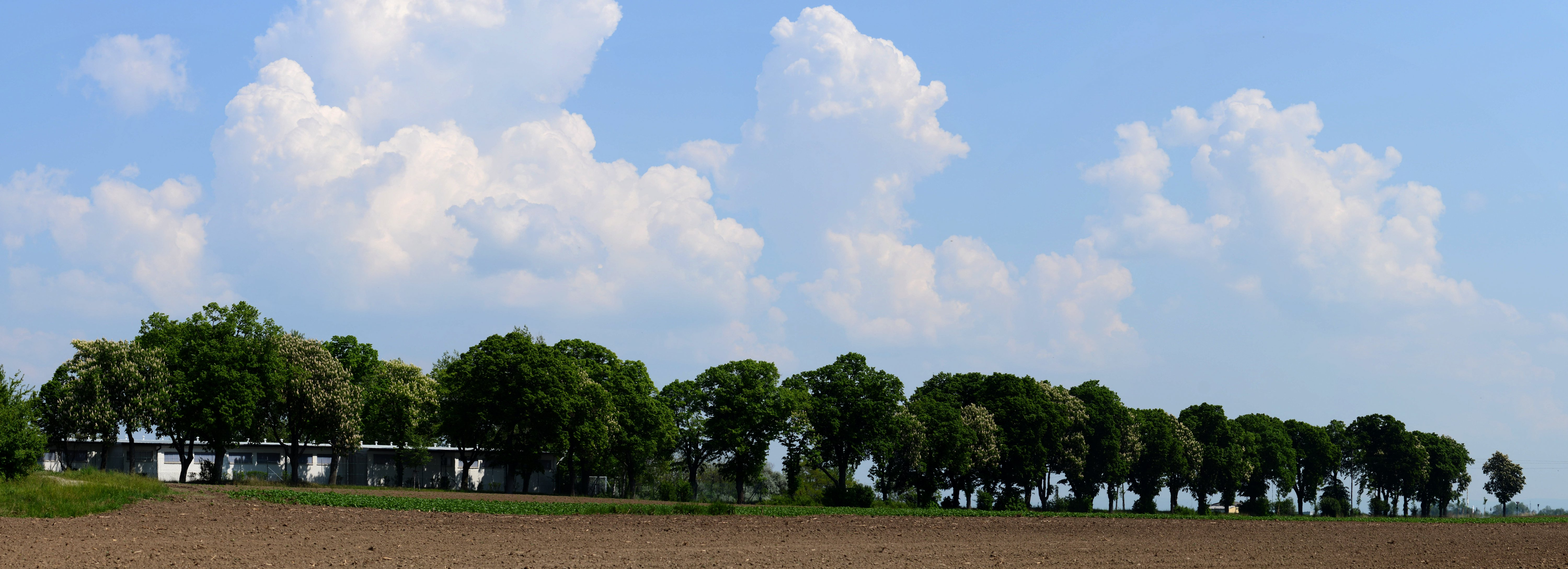 Kastanienallee, Lindenallee This media shows the natural monument in Lower Austria with the ID GF-056.